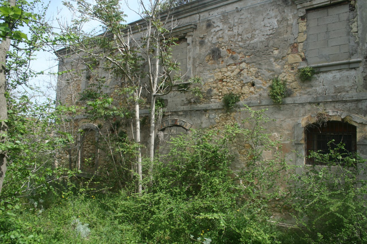 Uno dei fabbricati dello storico complesso della Ferromin S.a.